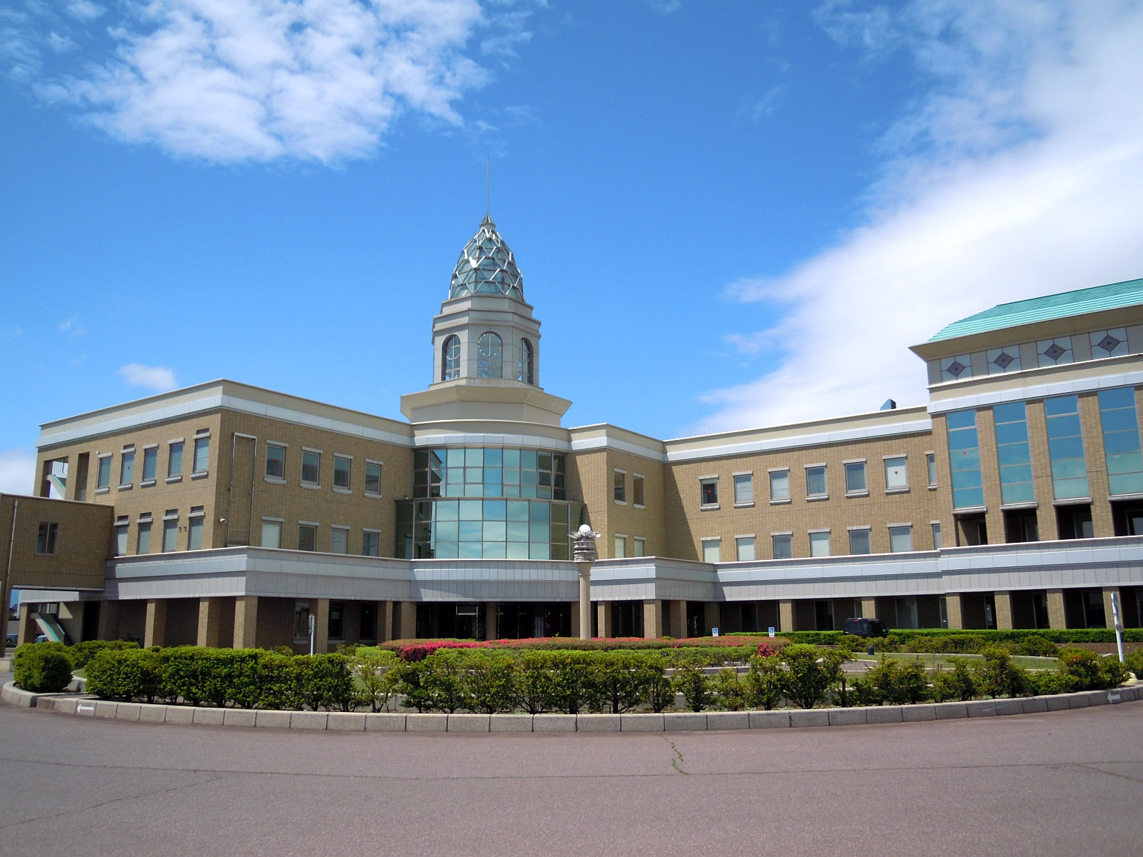 青森県平川市にある平川市役所尾上総合支所（旧尾上町役場）。平川市尾上図書館も併設